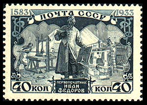 A en:1933 Soviet stamp representing Ivan Fedorov monument in Moscow, opened in en:1909.